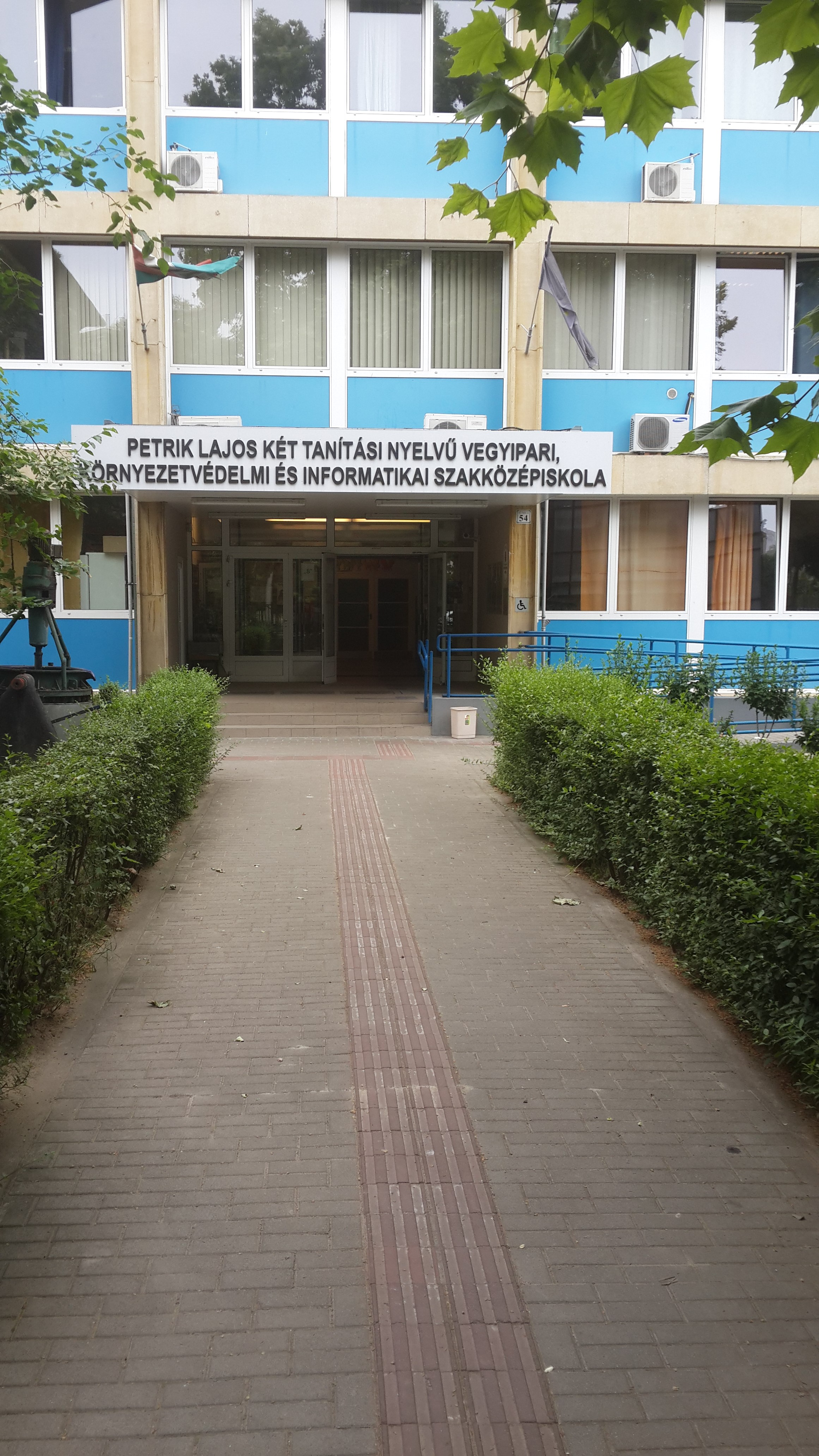 Petrik Lajos Szakközépiskola új épülete a Thököly útról nézve (Budapest)